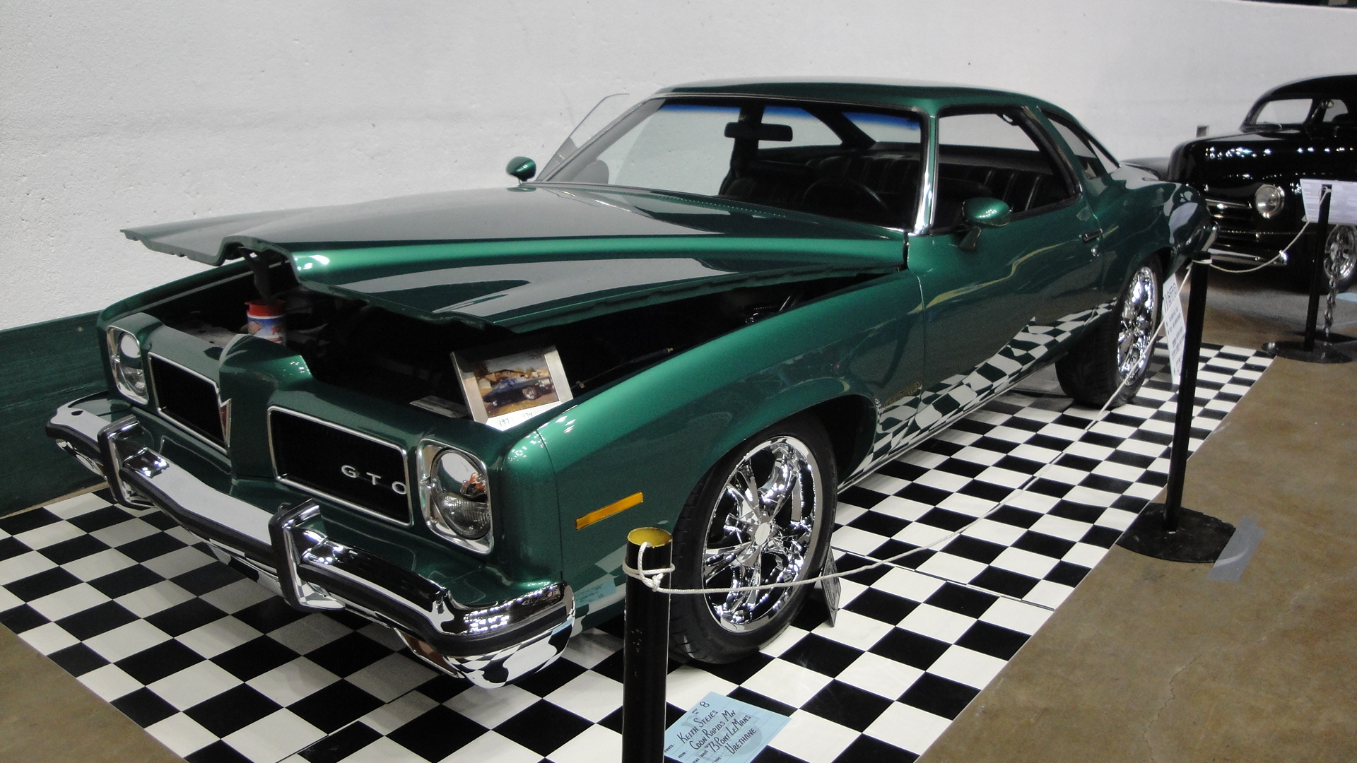 73 Pontiac GTO